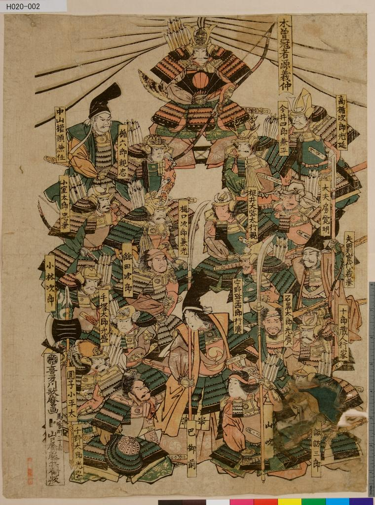 木曾冠者源義仲及其一門（キソ カンジャ ミナモト ヨシナカ オヨビ ソノ イチモン）